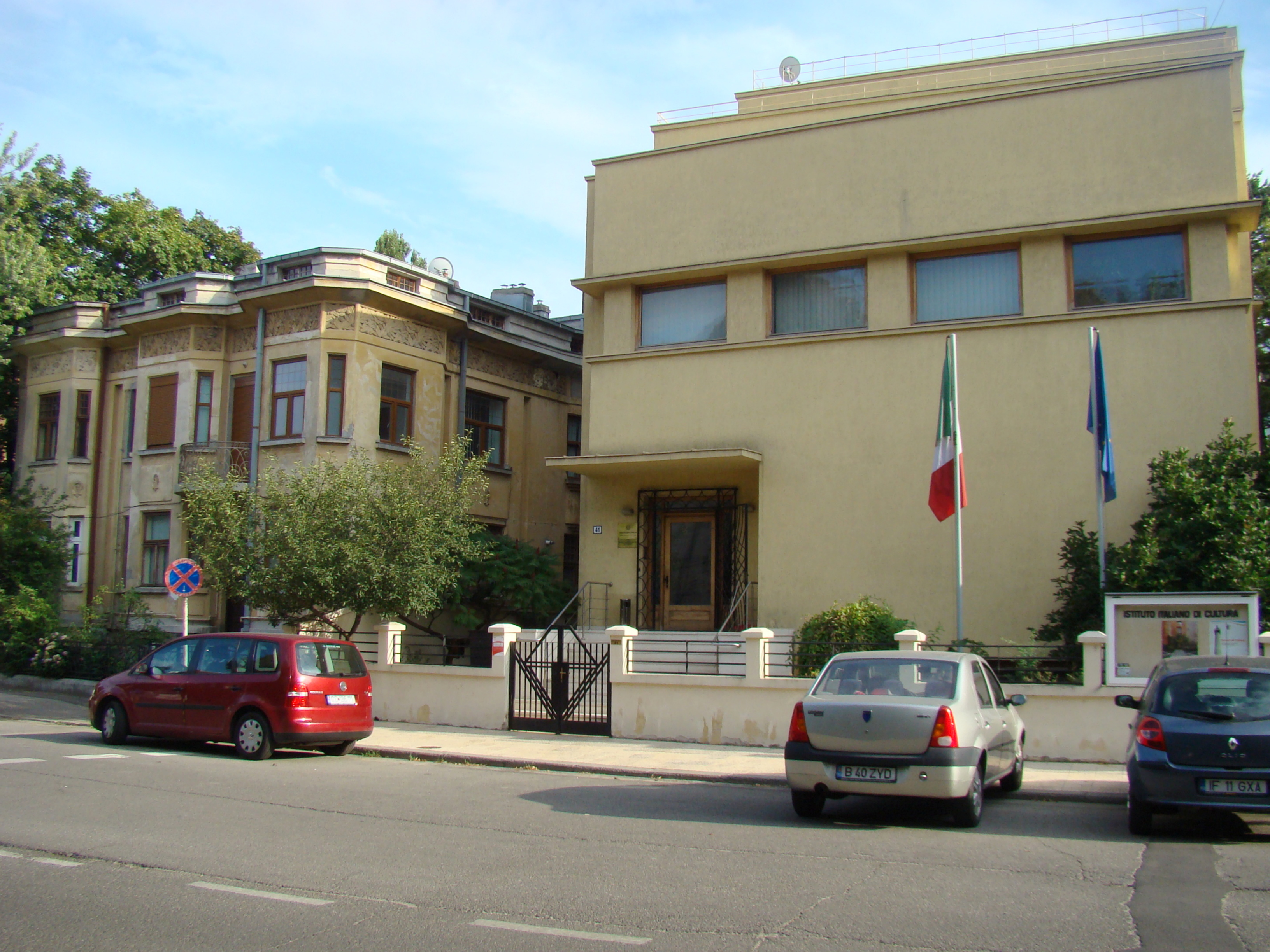 Casă monument istoric, str. Aleea Alexandru, nr. 41